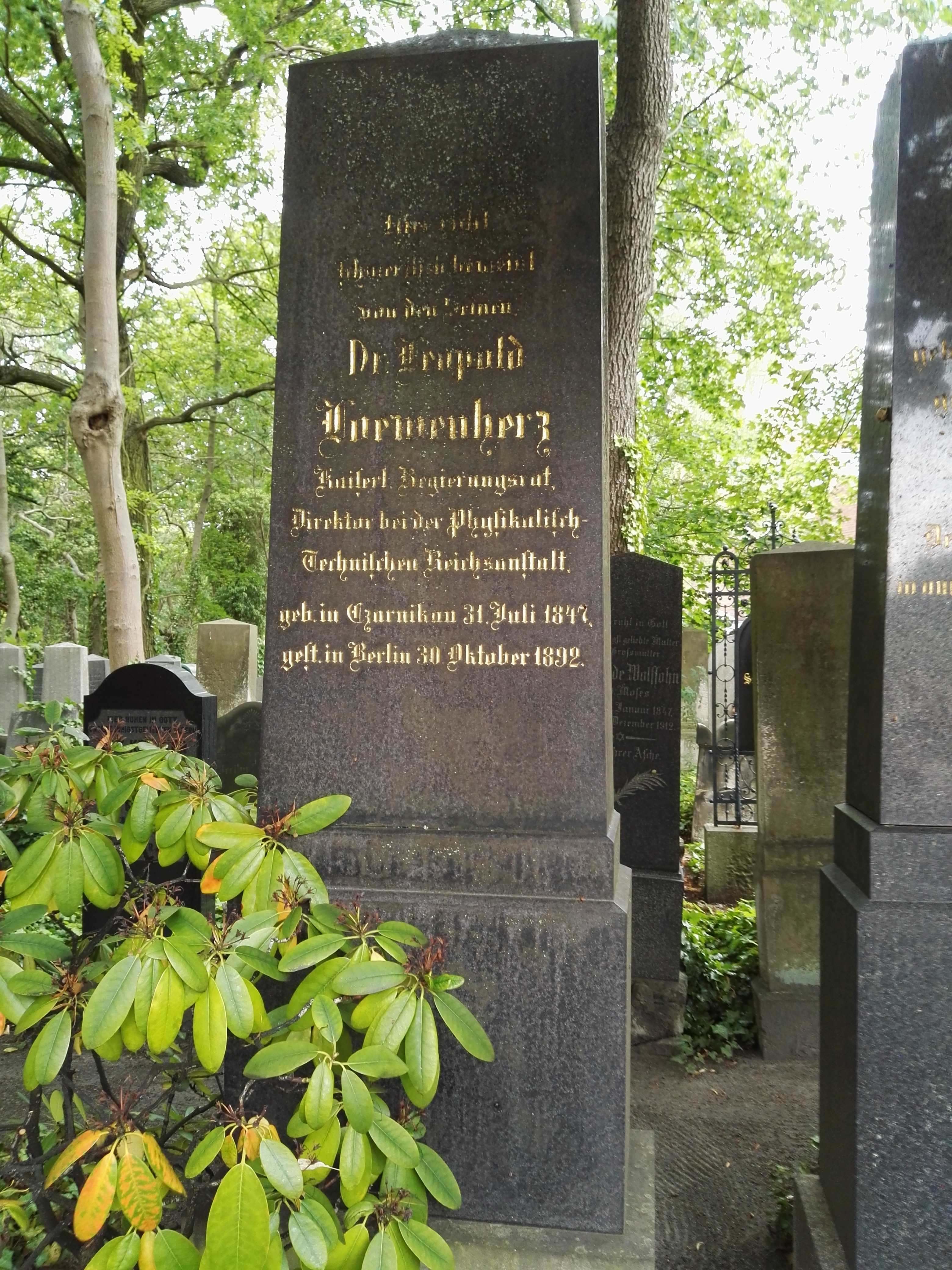 Grab von Leopold Loewenherz auf dem denkmalgeschützten Jüdischen Friedhof Berlin-Weißensee